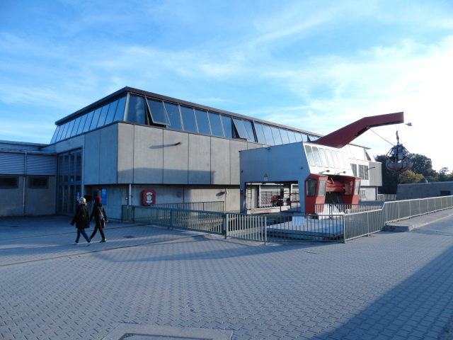 Turbinenhaus des Laufwasserkraftwerks Regensburg